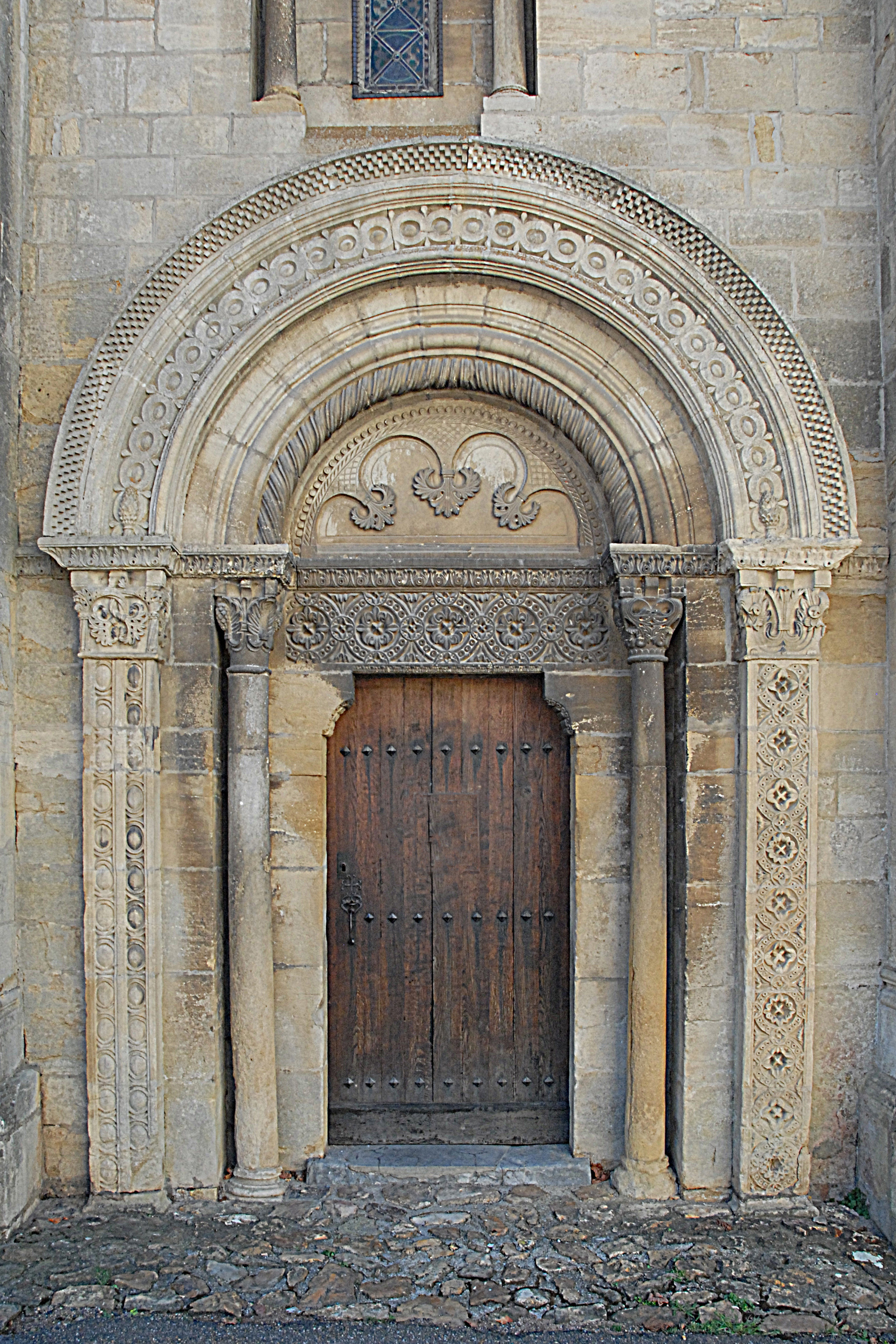 St-Hilaire de Semur-en-Brionnais, Nordportal